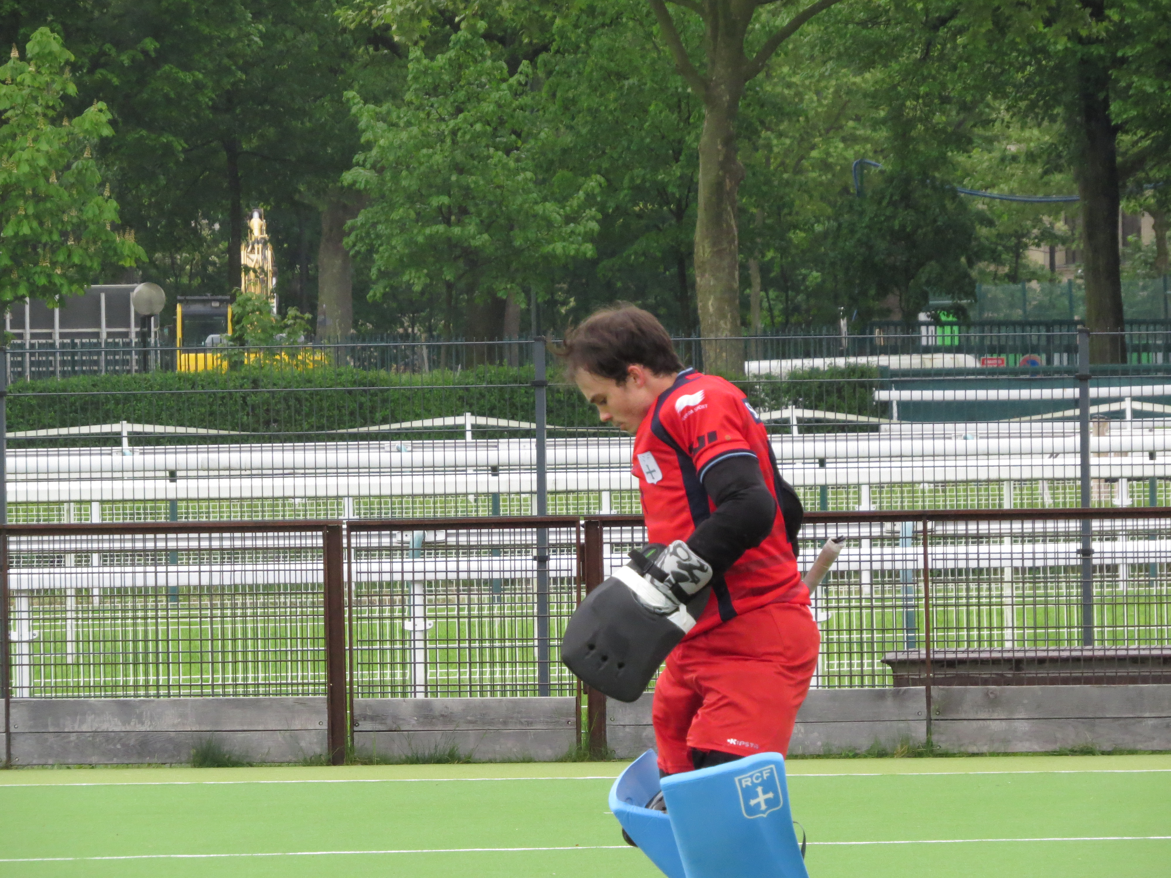 Finale du championnat de France masculin de hockey sur gazon 2014-2015 sur le terrain du PJB Victoire du Racing 3-1